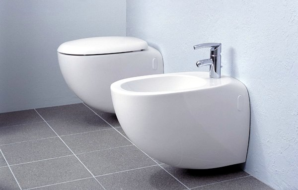 Bidet wiszący serii Ego Sanitec KOŁO from PL